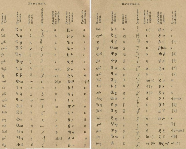 грузинский алфавит